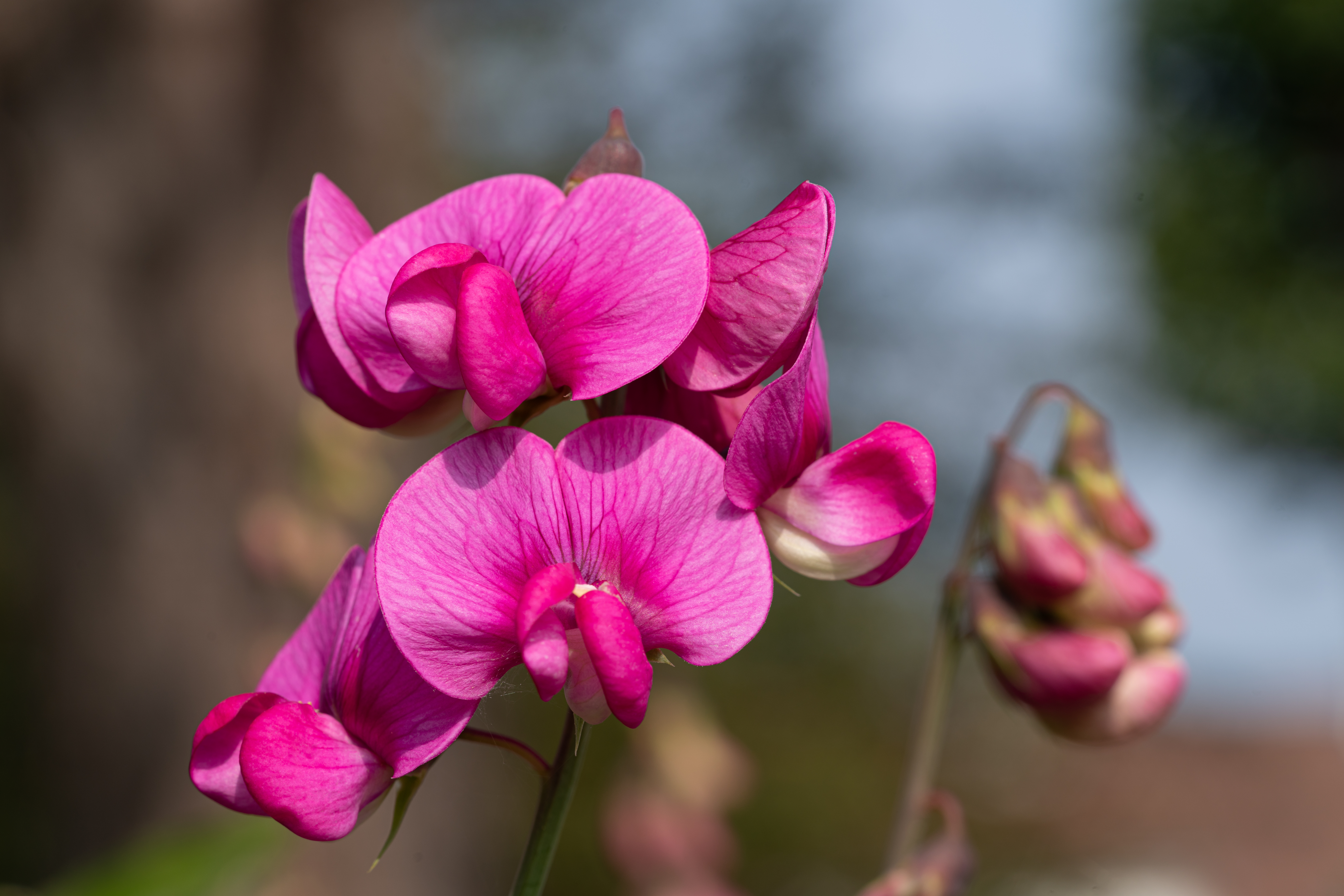 La fleur d'une Lathyrus latifolius L. de la famille des Fabaceae. La photo a été identifiée sur